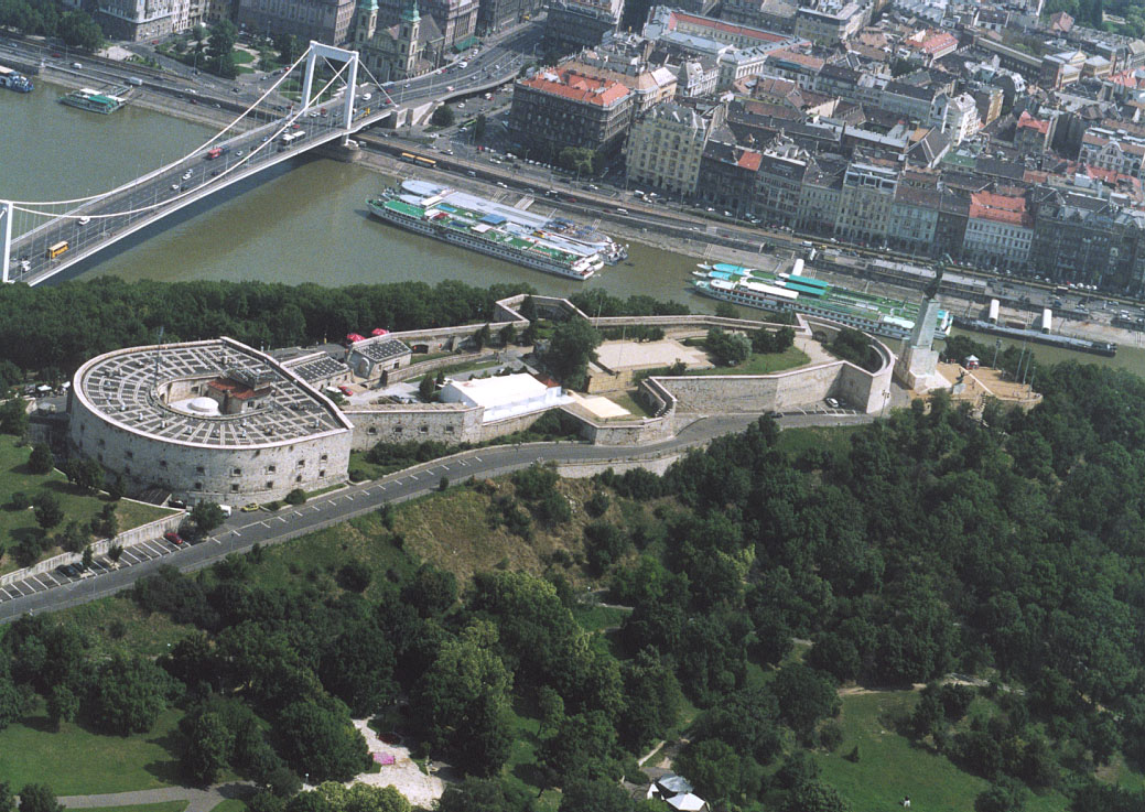 Citadel - Budapest - Hungary - Europe